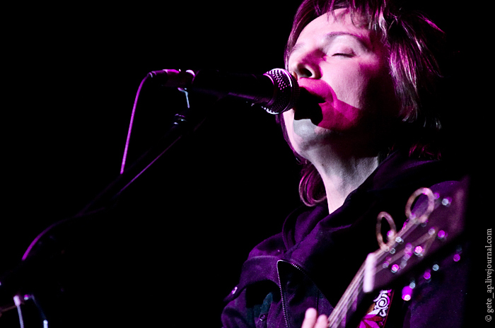 Svetlana Surganova